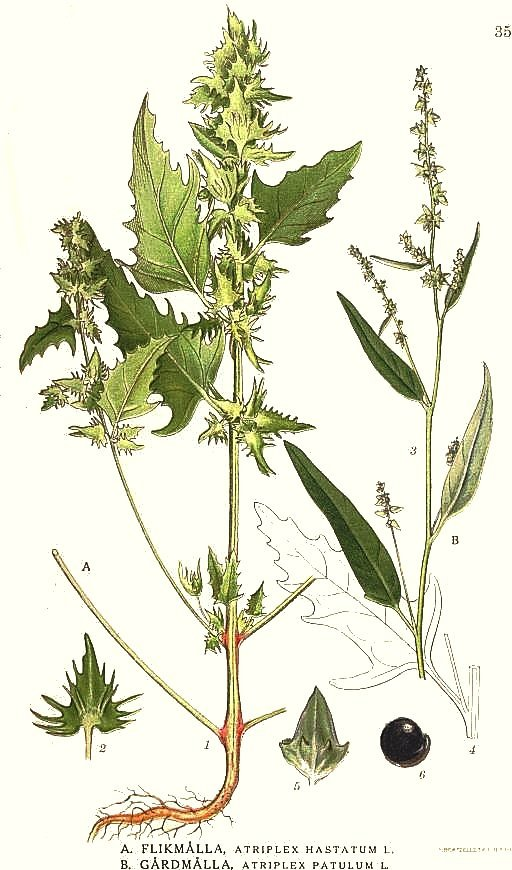 A. Atriplex calotheca (Rafn) Fr. B. Atriplex patula L. Original Description A. Flikmålla, Atriplex hastatum L. B. Gårdmålla, Atriplex patula L.